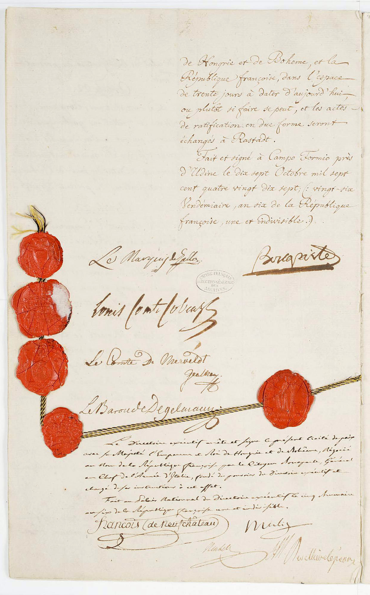 Traité de Campo-Formio entre la République française, représentée par Napoléon Bonaparte, et l'Autriche, représentée par Martius Mastrilli, Louis de Cobenzl, Maximilien de Mervelot et Ignace de Degelmann. Acte rédigé en français, daté du 26 vendémiaire an VI (17 octobre 1797), à Campo-Formio, Italie.